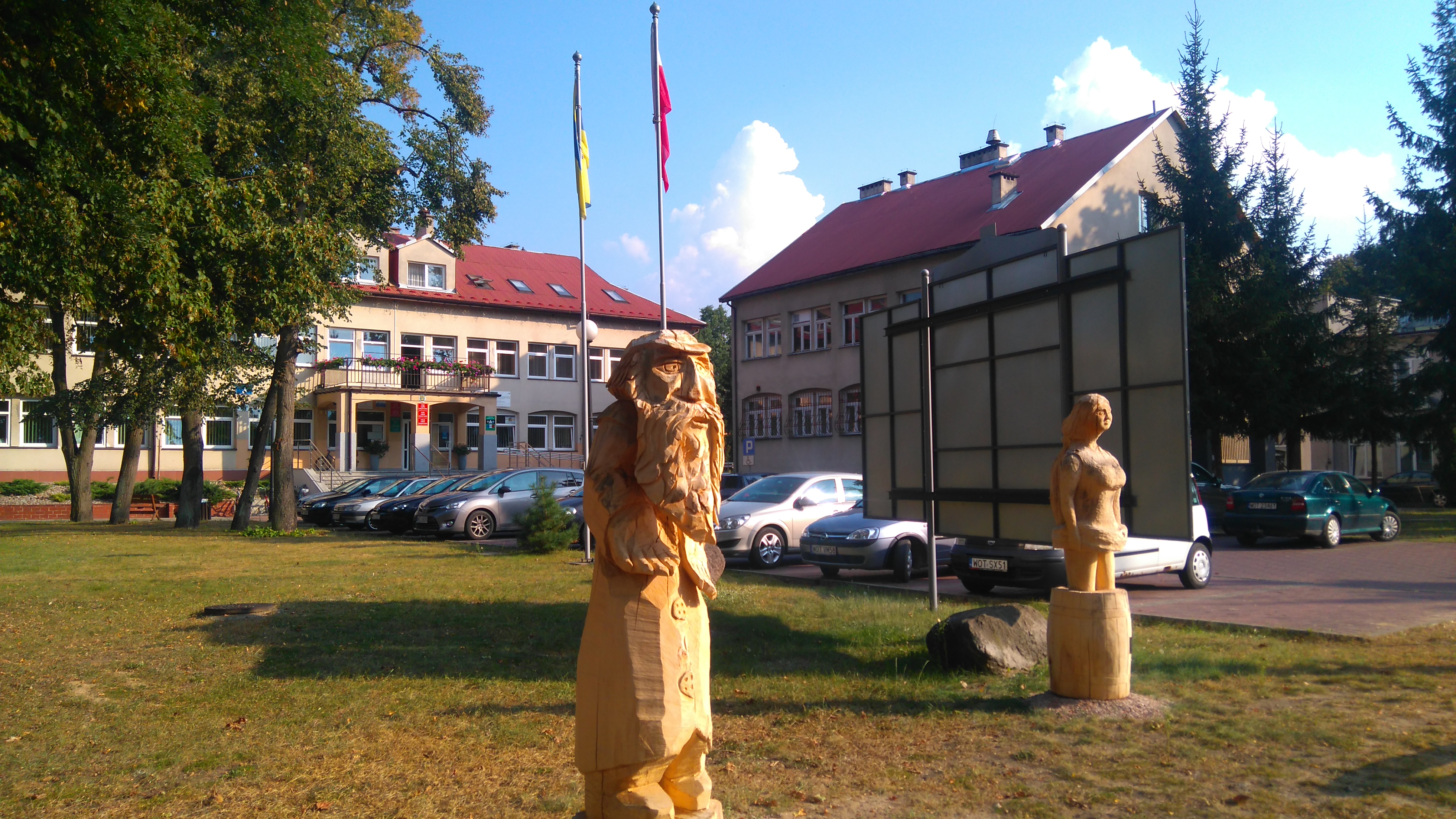 Festiwal rzeźbiarski przed UG Celestynów